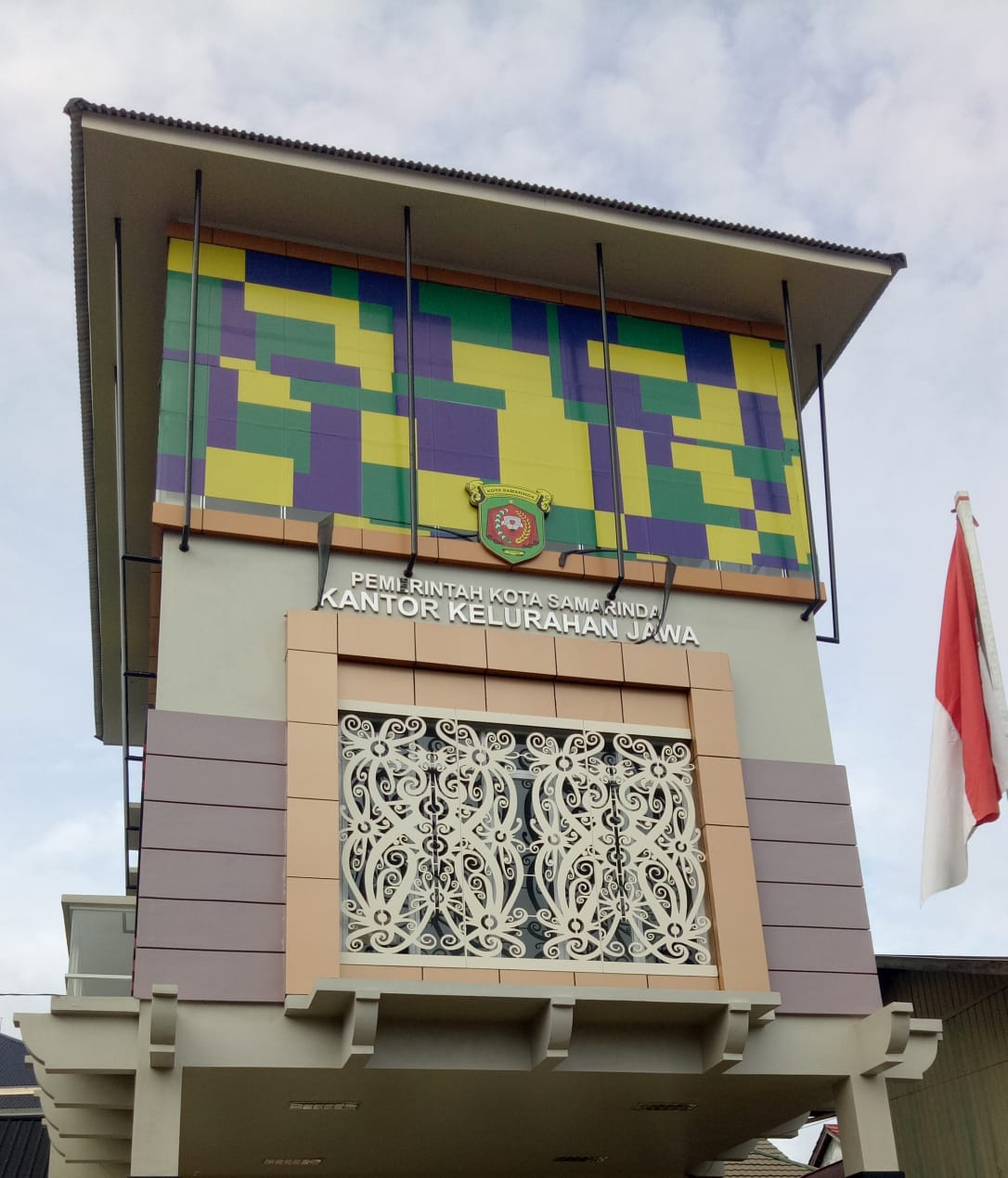 foto di ambil di kantor kelurahan jawa samarinda yang baru, menampilkan foto kantor kelurahan jawa samarinda terbaru. foto tersebut di ambil pada tanggal 8 juli 2020